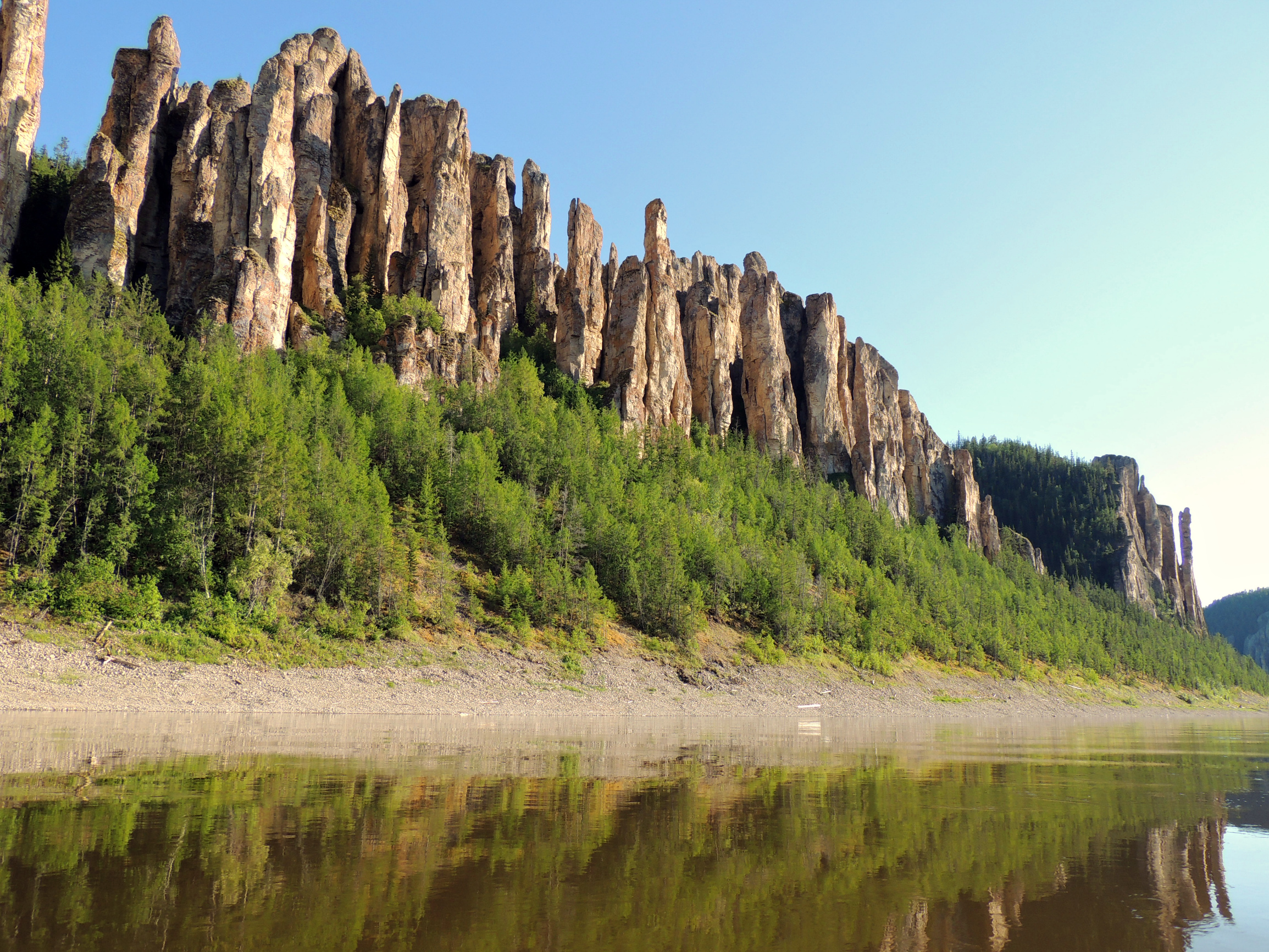 Ленские столбы — геологическое образование и одноимённый природный парк в России, на берегу реки Лены. Находится в Хангаласском улусе Якутии в 104 км от города Покровска. This image is related to the protected area of Russia number 1410189